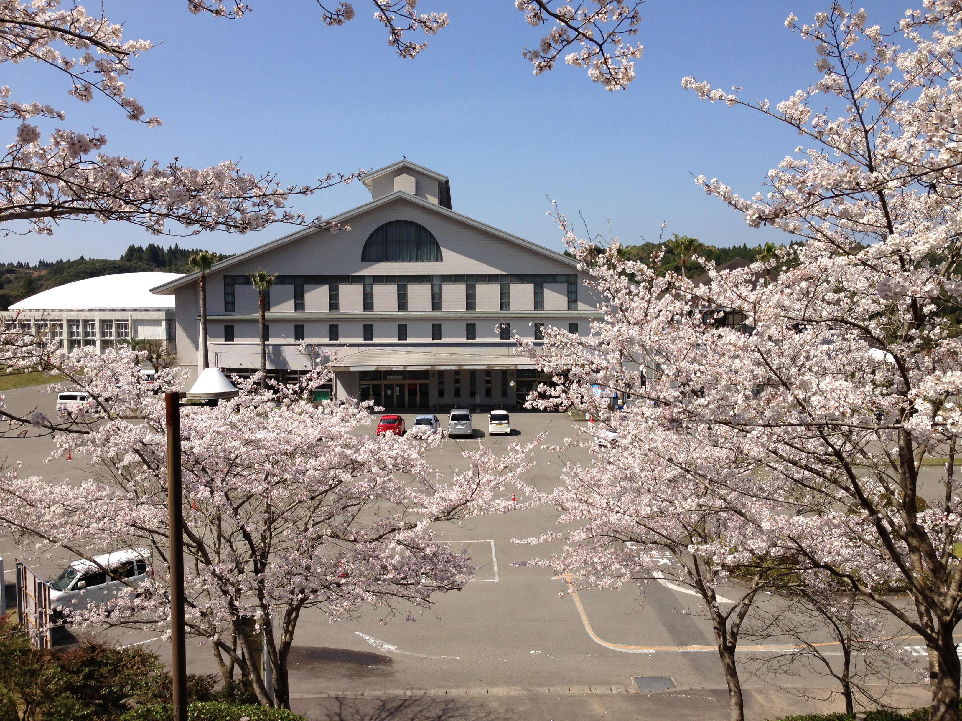 松元平野岡体育館の外観。温泉施設も併設している。